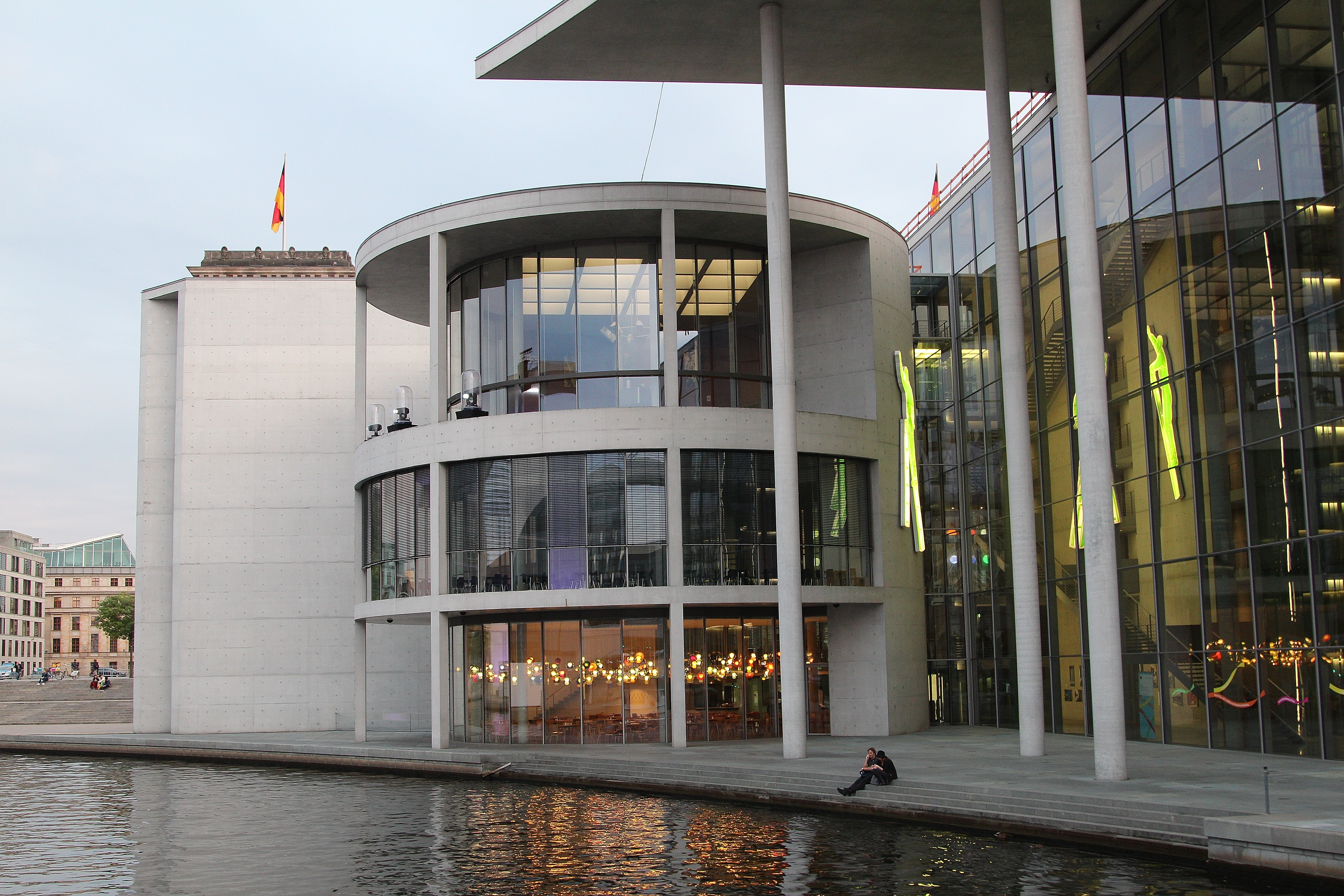 Berlin: Paul-Löbe-Haus im Abendlicht